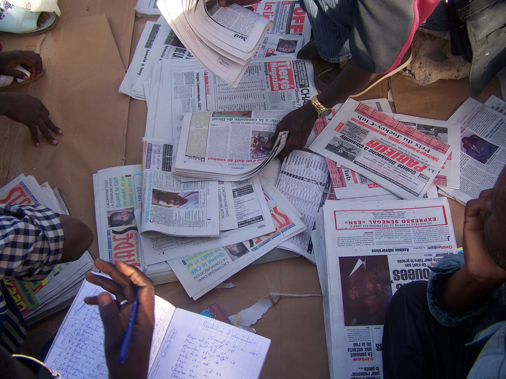 senegal dakar